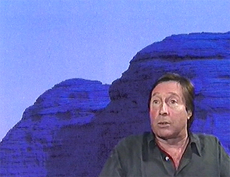 Portrait de Jean Vérame